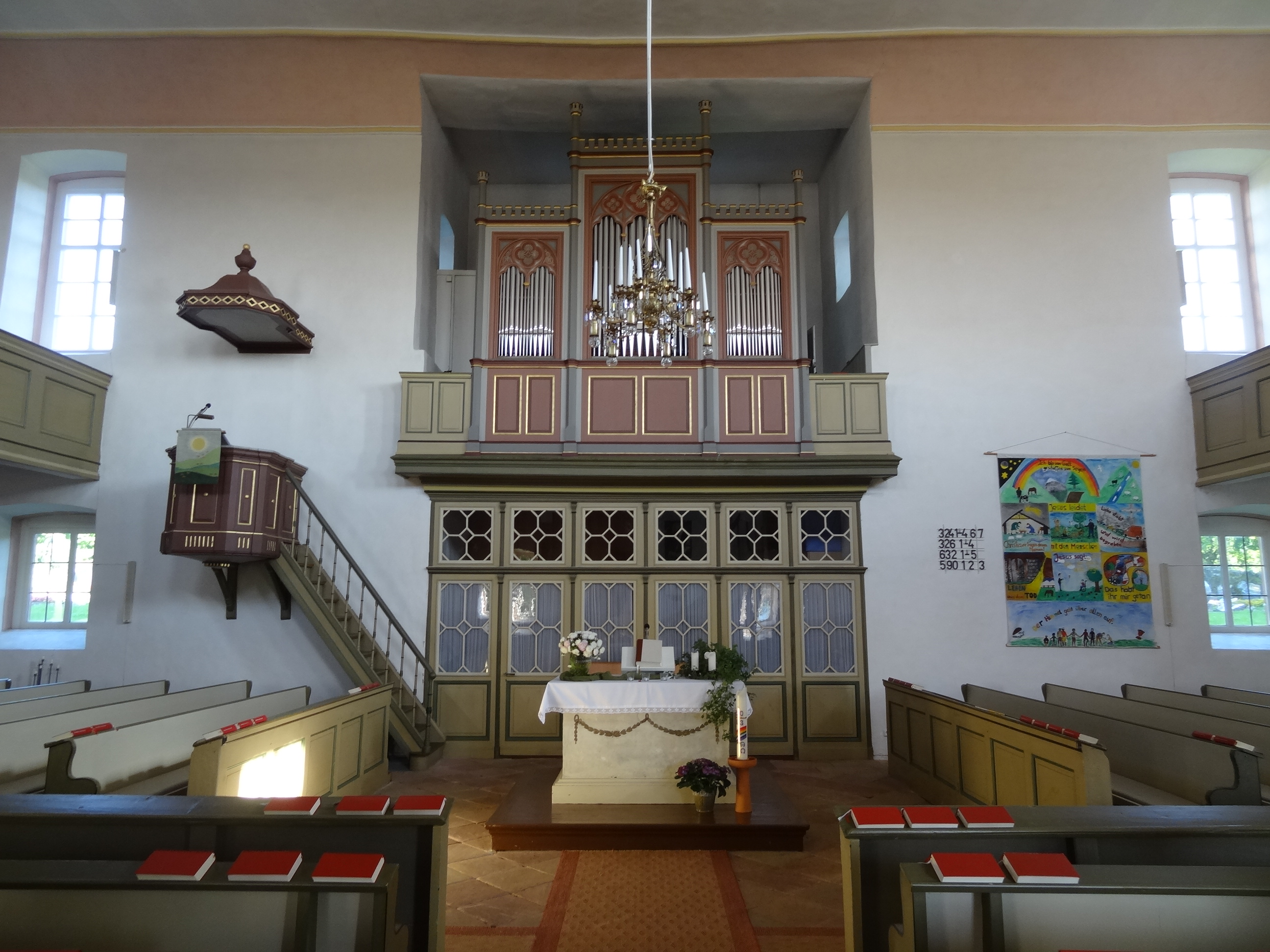 Evangelische Kirche Bellersheim